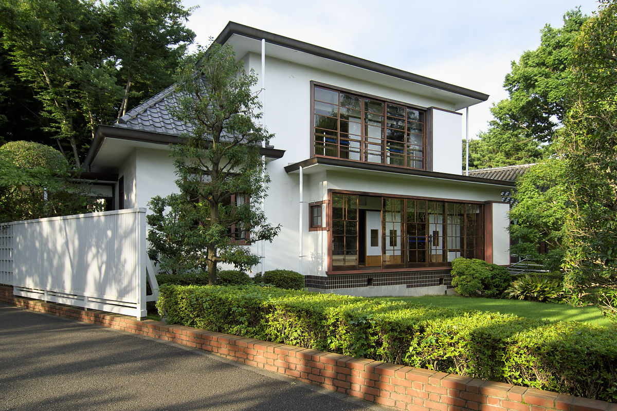 小出邸、江戸東京たてもの園。